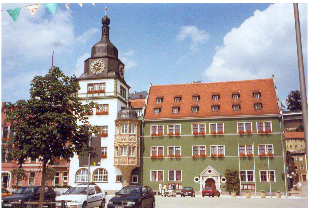 Das Rathaus von Rudolstadt.